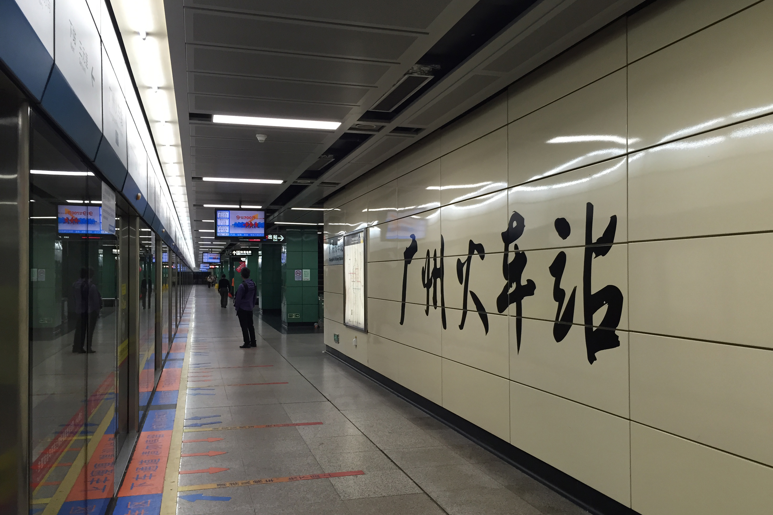 广州地铁广州火车站